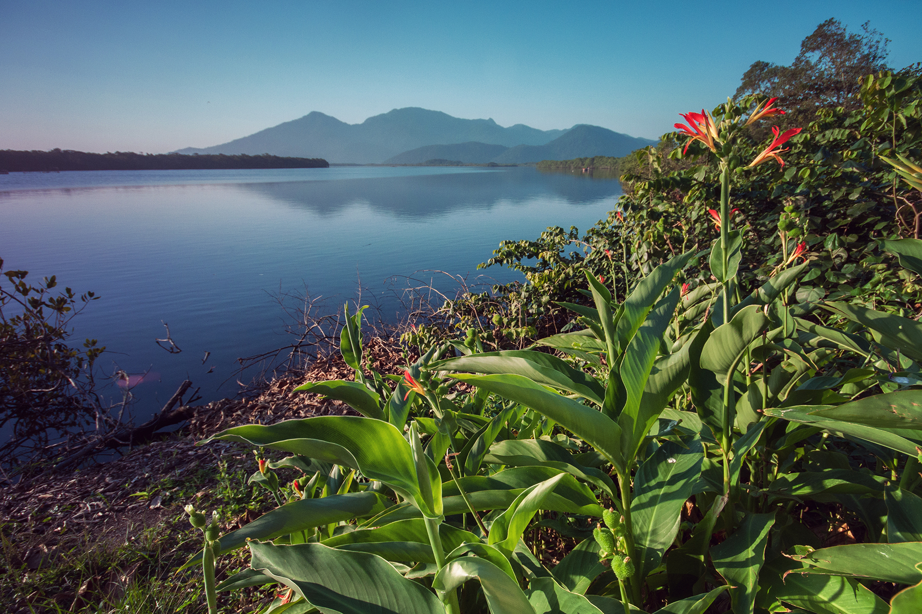 Canal entre a ilha e o continente